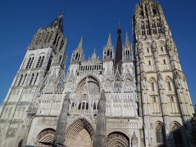 La façade en 2013